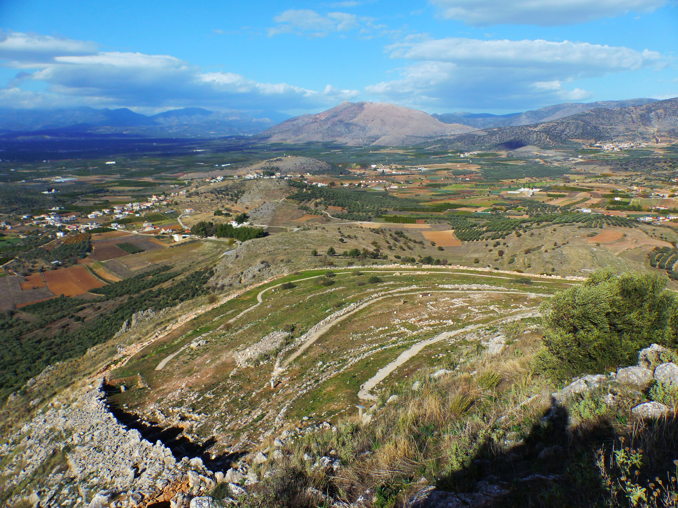 Terrasses sud de l'acropole inférieure de Midéa, en Argolide.